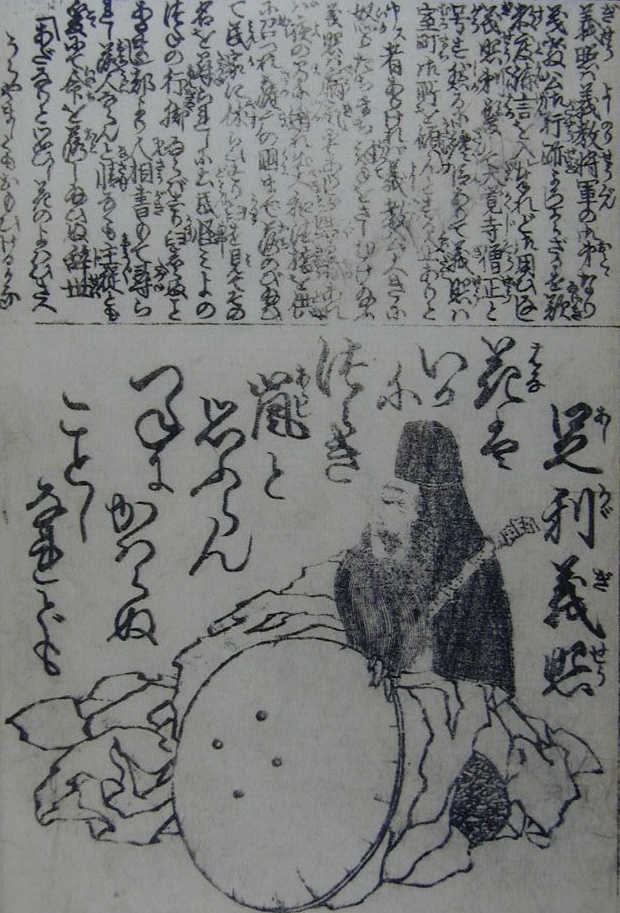 ashikaga_gisyo